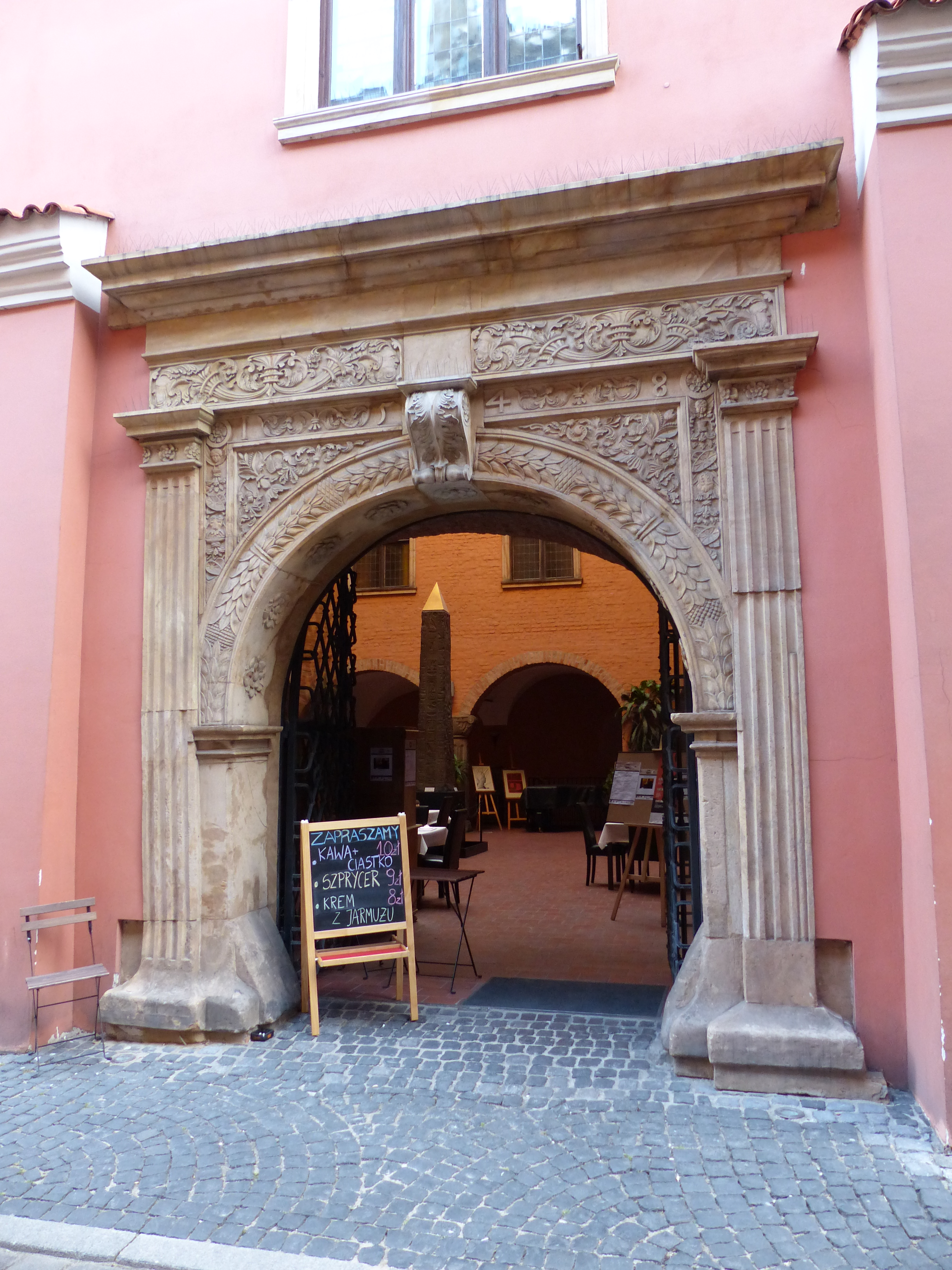 Ansicht der Stadt